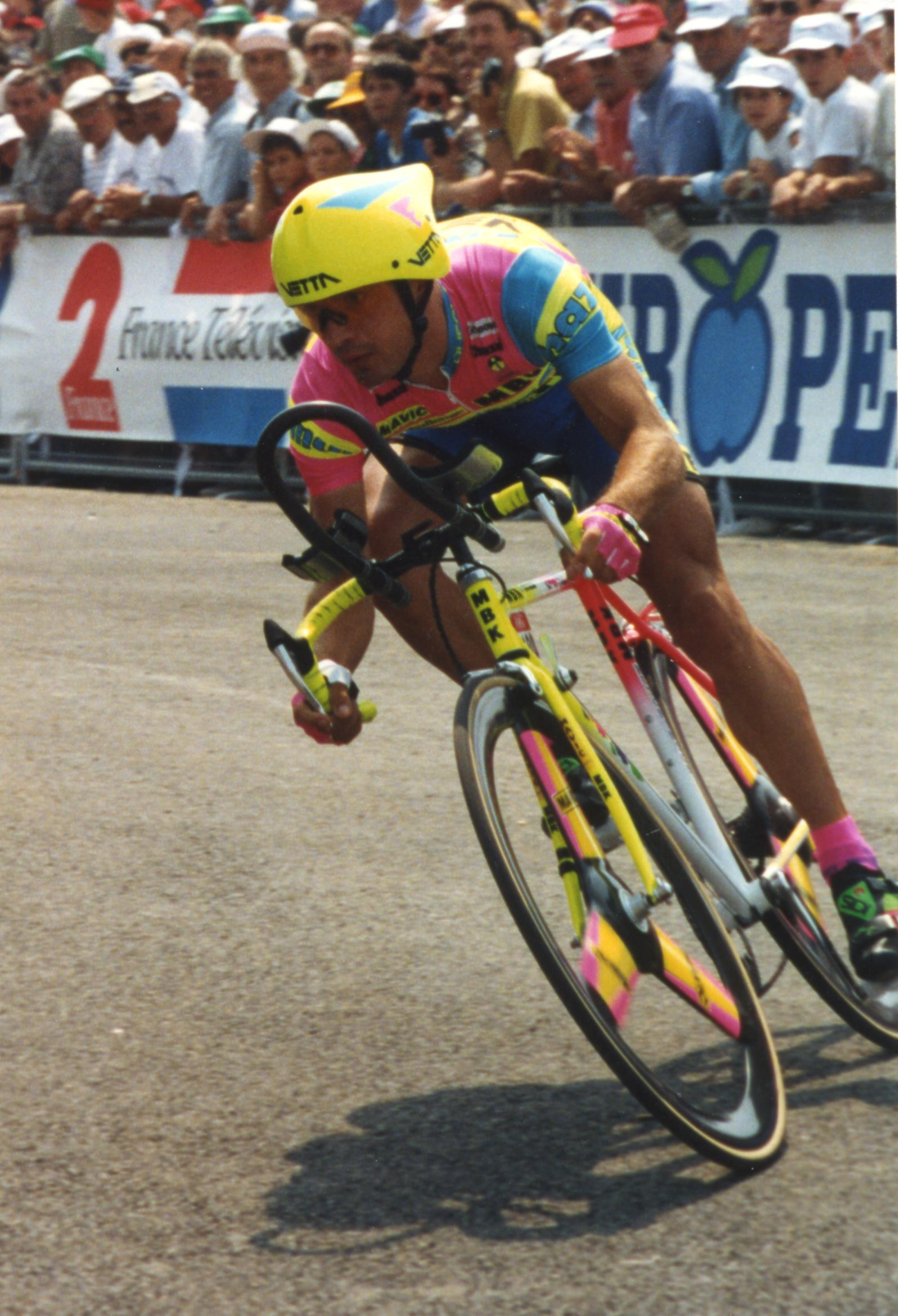 TOUR DE FRANCE 1993